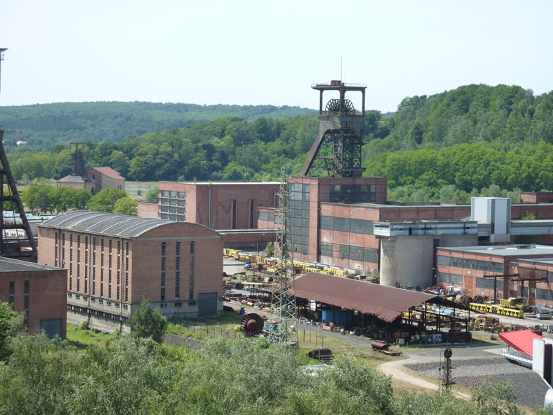 SIEGE WENDEL PUITS 3